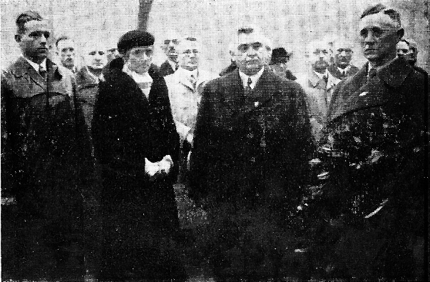 Totenehrung bei der Wiedersehensfeier. Im Vordergrund von links:, der älteste Sohn des Oberleutnants Rohr, Frau Rohr, Reichskameradschaftsführer Kirchhofer. Erste Wiedersehensfeier des Sturm-Bataillon Nr. 5 (Rohr) nach dem Krieg in Bochum. Elisabeth Rohr zog als Witwe in die Roeckstraße 42, wo sie bis 1980 als Pensionärin wohnte.